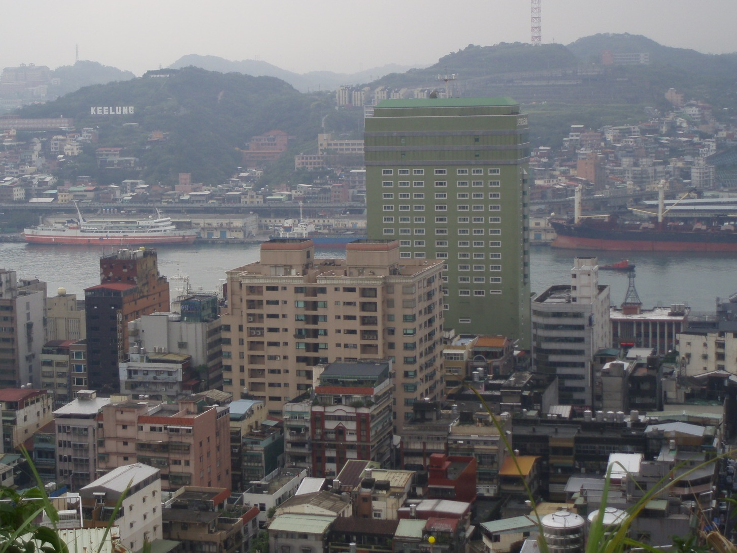 基隆港泊港船隻與長榮桂冠酒店（基隆）。